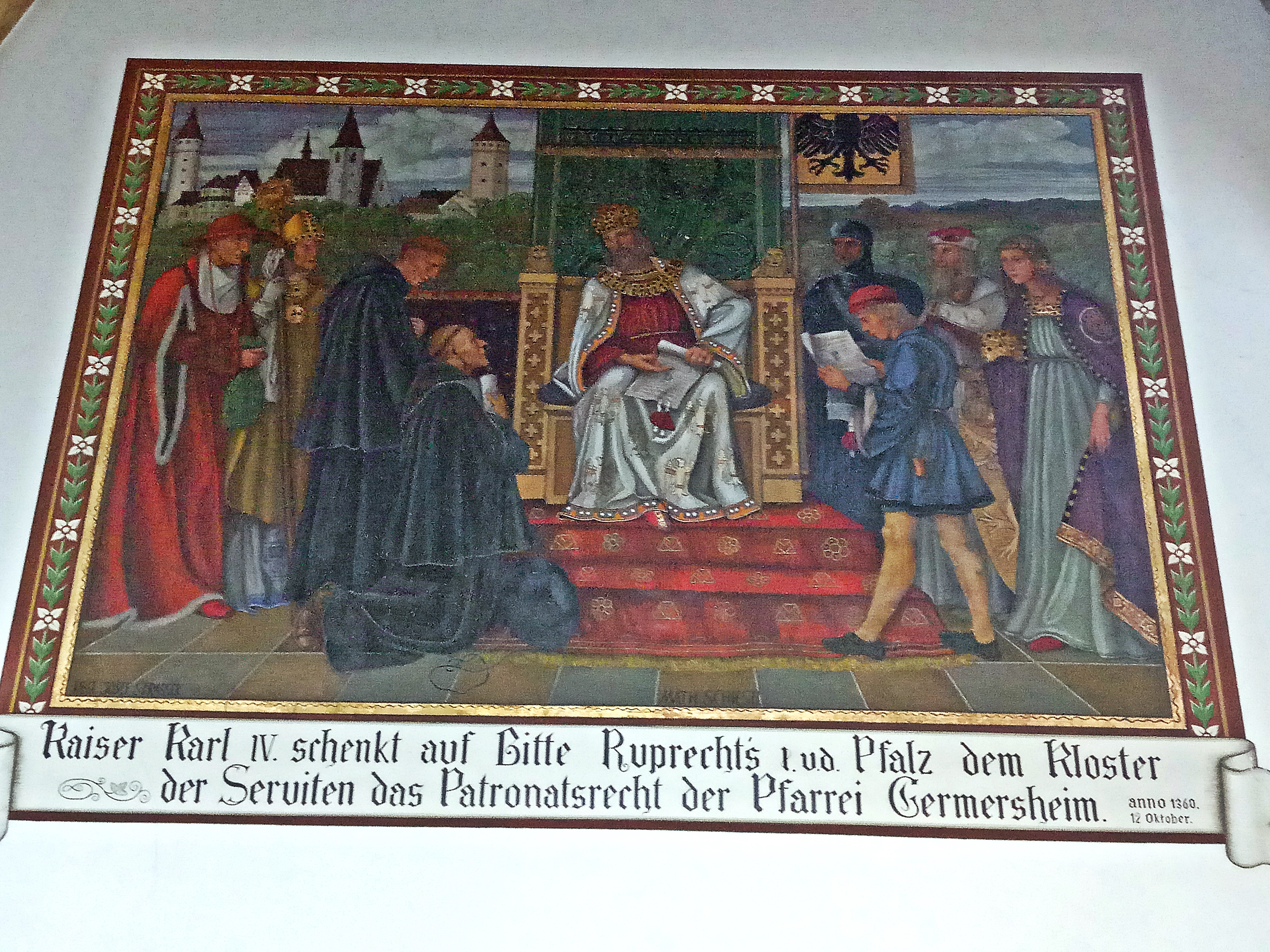 Schiestl, Germersheim, St. Jakobus, Erteilung des Patronatsrechtes